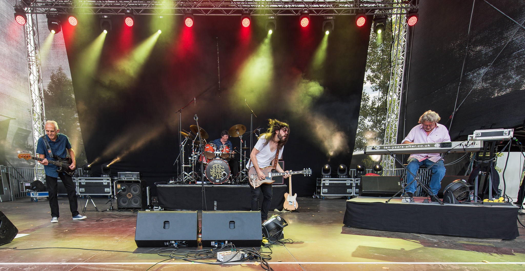 Chick Churchill,Colin Hodgkinson,Concertbüro Franken,Festival,Konzert,Lieder am See,Livekonzert,Livemusik,Marcus Bonfanti,Michael George Churchill,Musik,Ric Lee,Richard Lee,Ten Years After